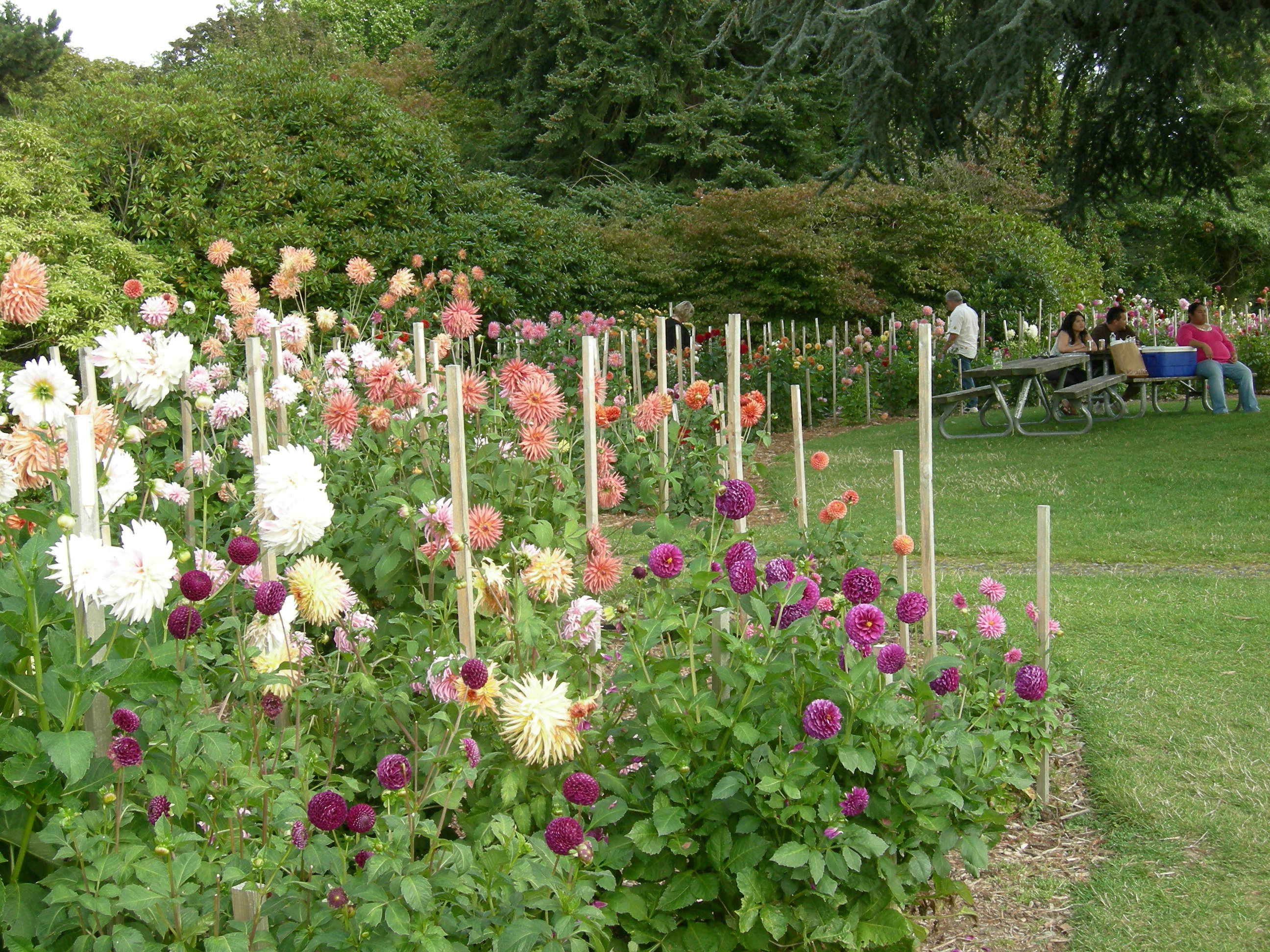 General view of Volunteer Park Dahlia Garden, Volunteer Park, Seattle, Washington.